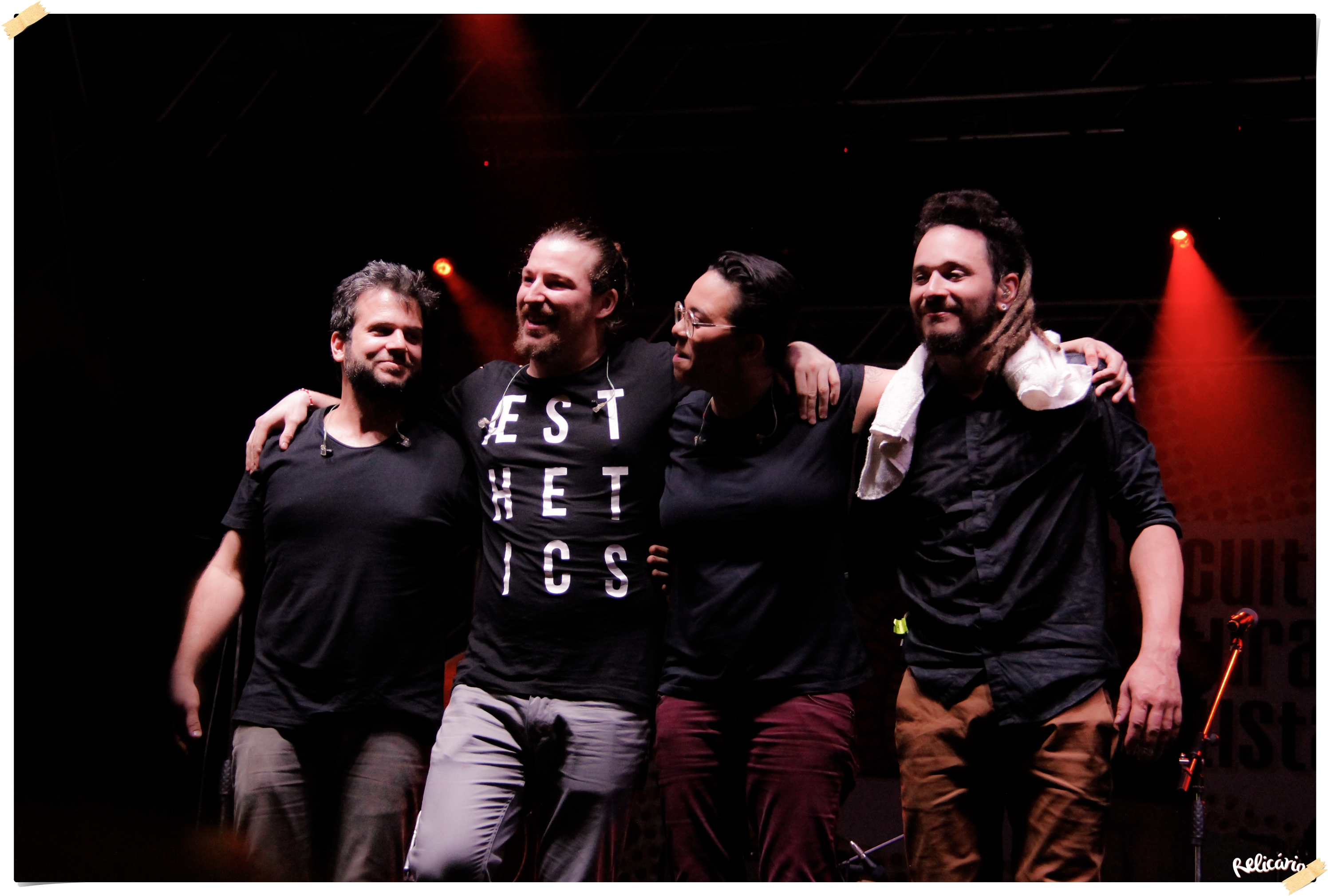 _MG_8878